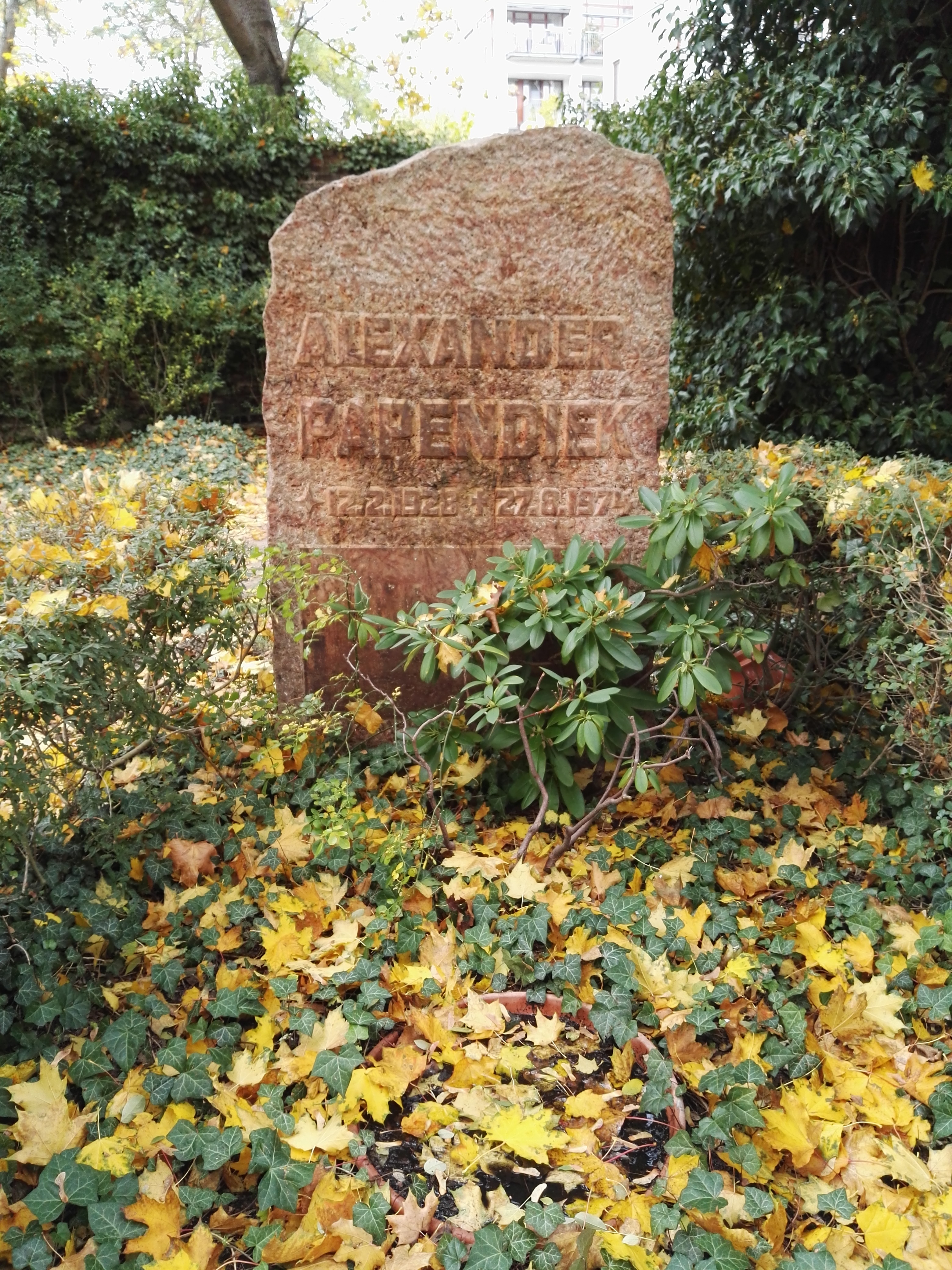 Grab von Alexander Papendiek auf dem Friedhof der Dorotheenstädtischen und Friedrichswerderschen Gemeinden in Berlin-Mitte